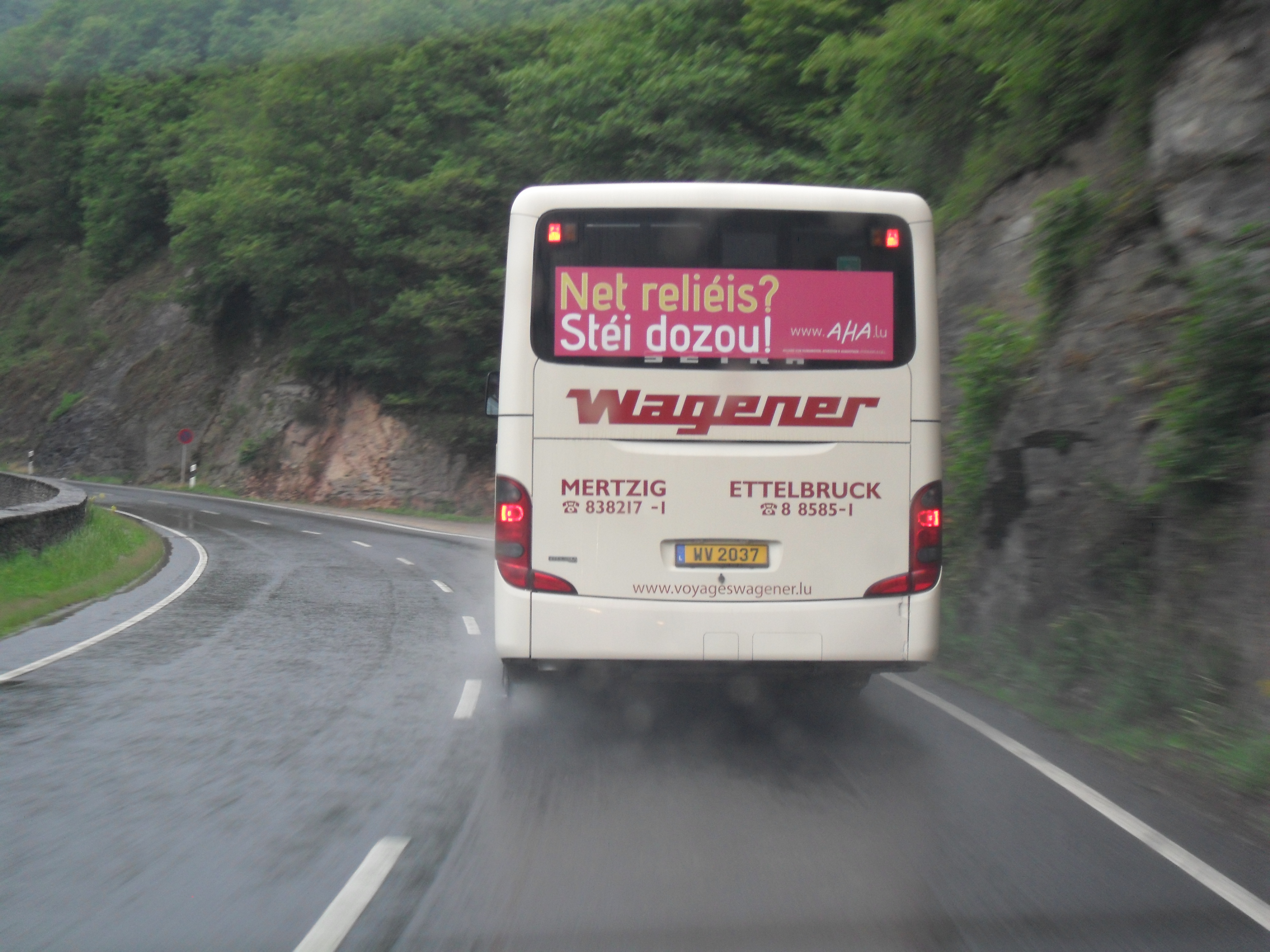 Campagne 'Net reliéis? Stéi dozou!' op Gefierer vum ëffentlechen Transportwiesen am Joer 2011